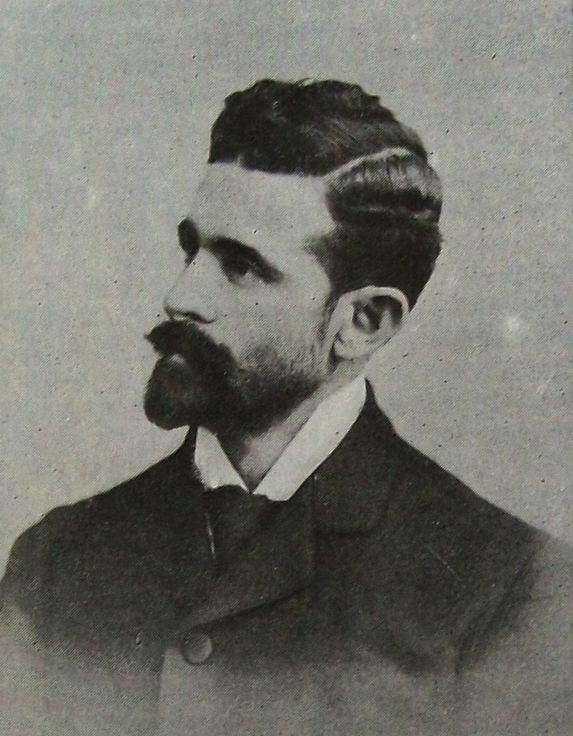 José Manuel Álvarez